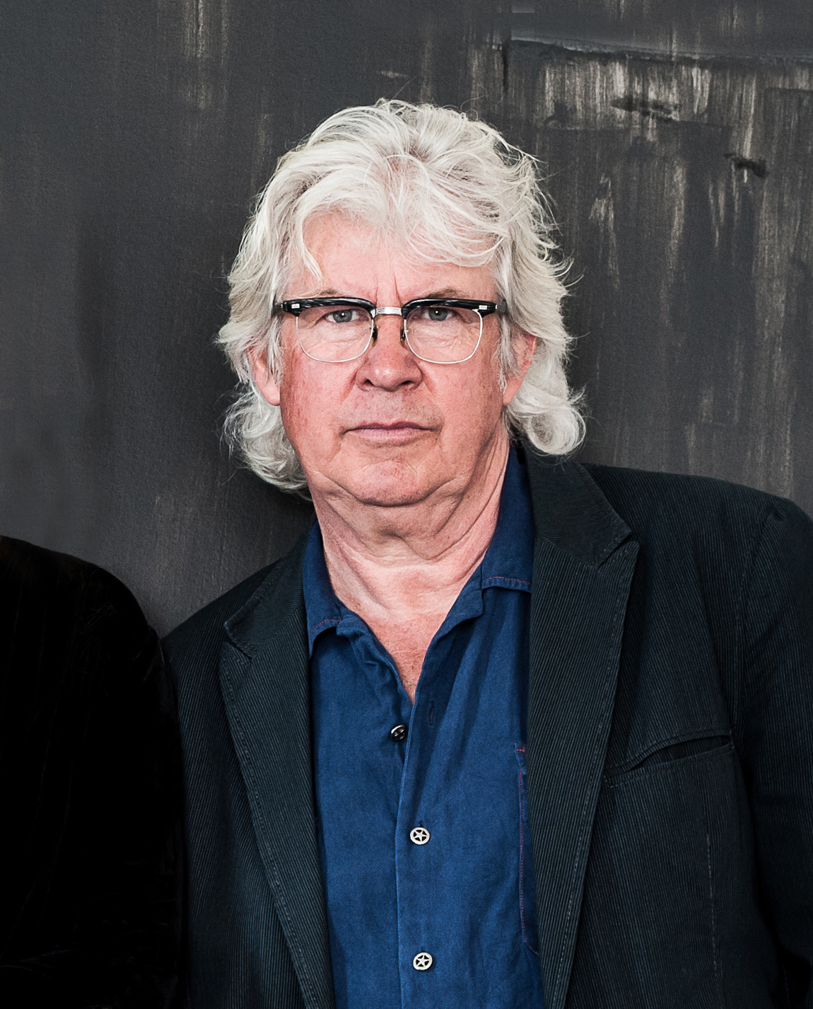 Trummisen Håkan Nyberg.